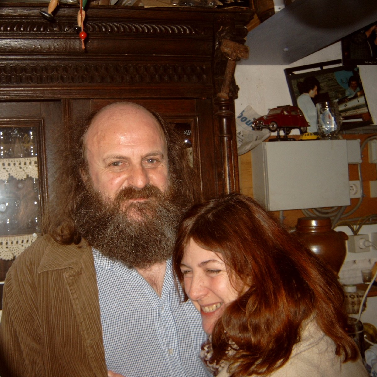 Claude Lentz, propriétaire de la Ferme de la Madelone et son épouse